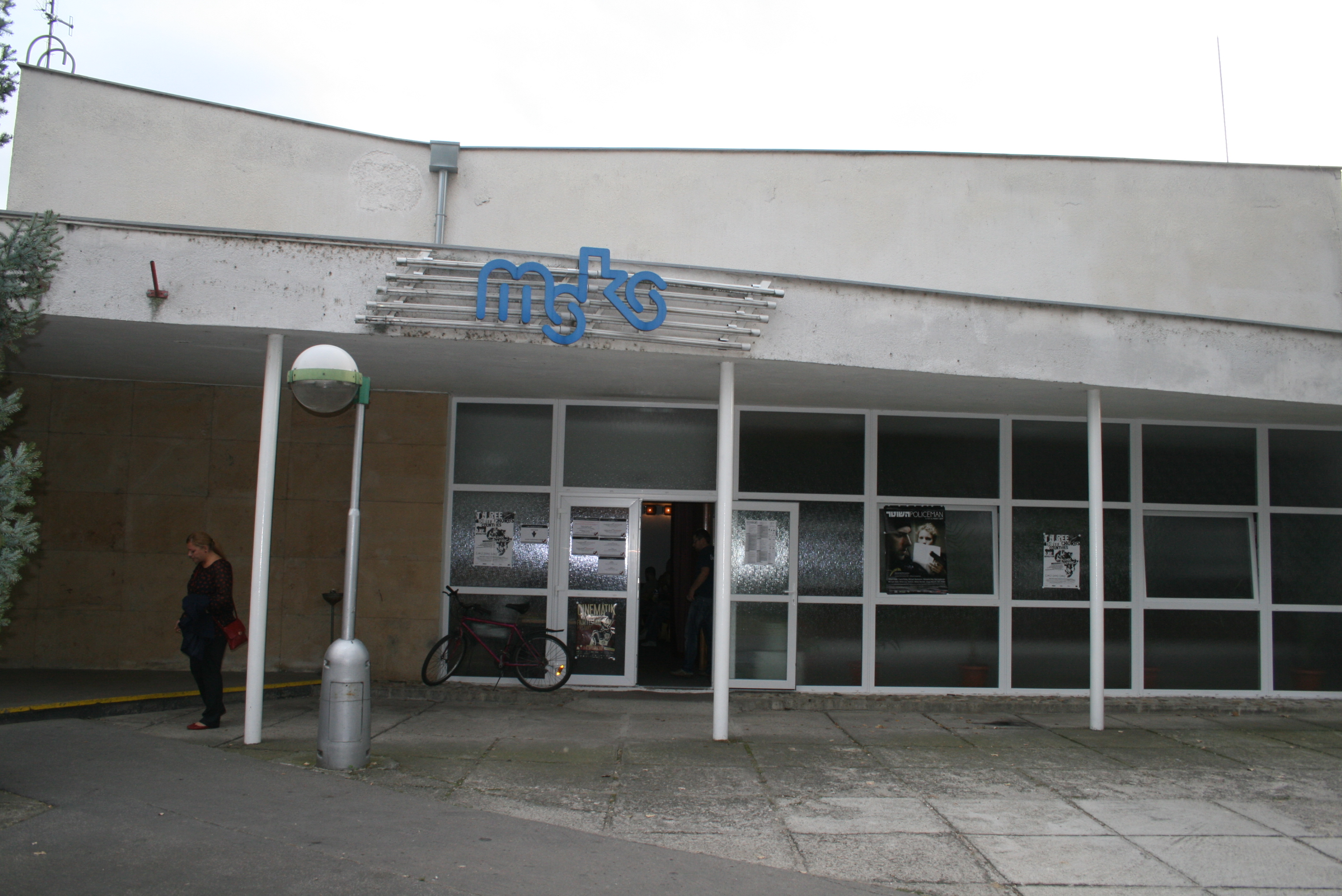 MsKS v Piešťanoch počas festivalu Cinematik 2012.